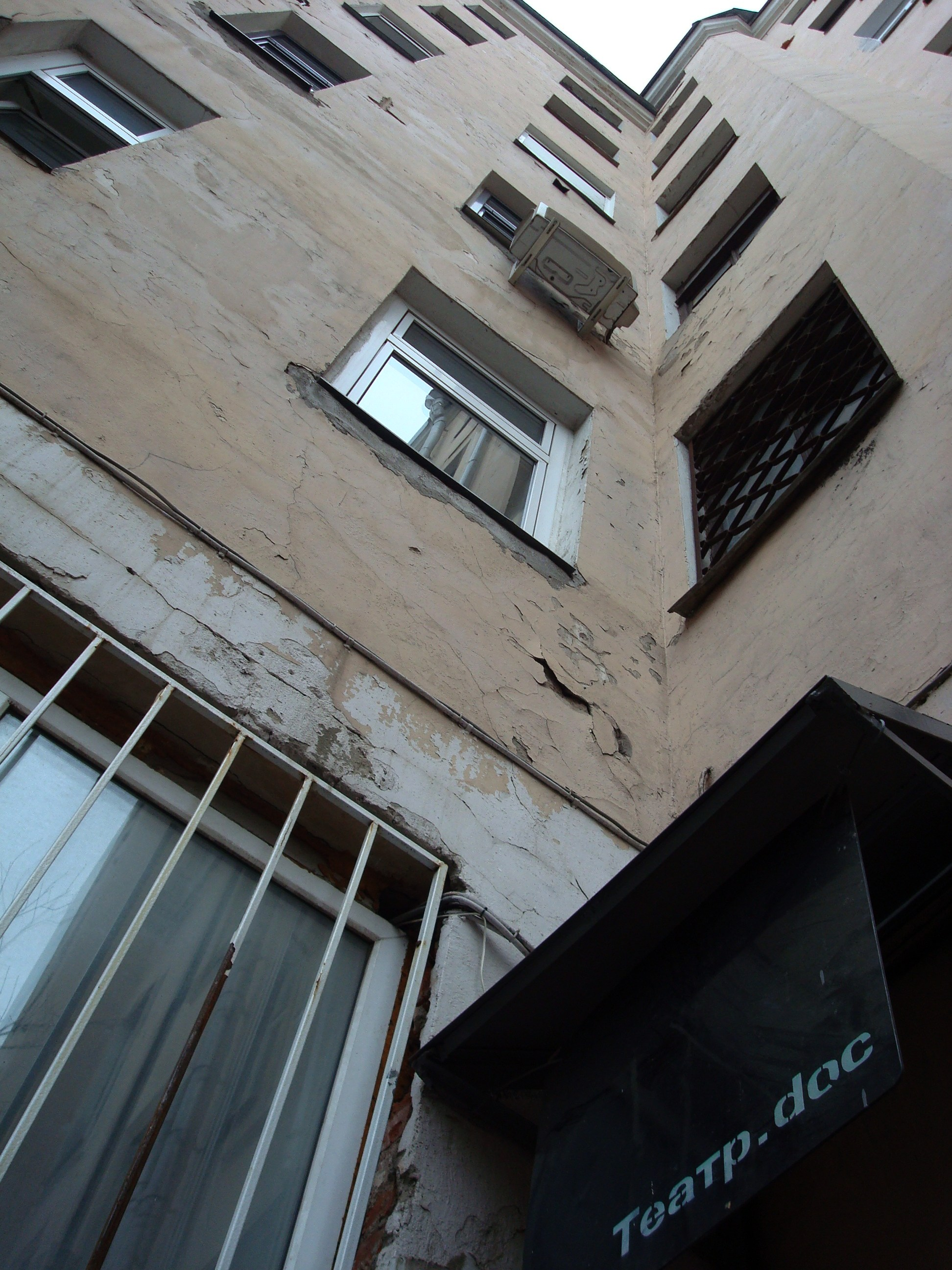 Московский Театр.doc. Москва, Трехпрудный пер. 11/13, стр. 1. Декабрь 2011